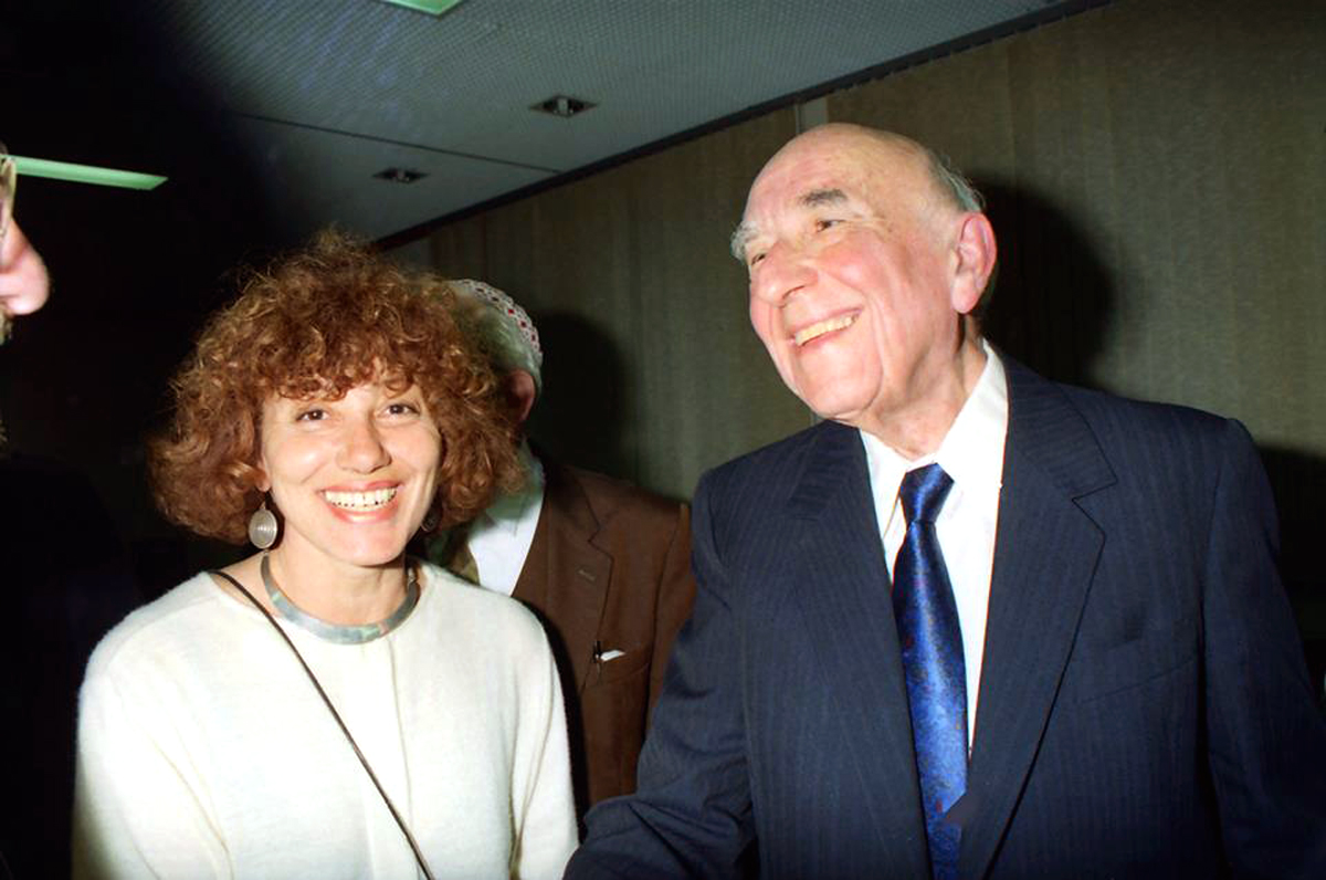 שנת 1991 בהשקת קובץ מאמרים של השופט חיים כהן. בעריכת עדינה מור חיים